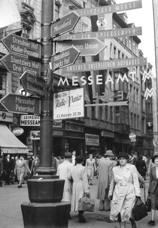 Leipzig, Peterstraße Leipziger Messe 1952 - Schaufenster des friedlichen Aufbaus. Vom 7. - 17. September 1952 findet die internationale Leipziger Messe als grosse Technische Messe und Mustermesse in 13 Messehallen (75.000 qm) auf einem ausgedehnten Freigelände (25.000 qm) und in 15 Messehäusern (80.000 qm) statt. UBz: Messebetrieb in der Peterstrasse.